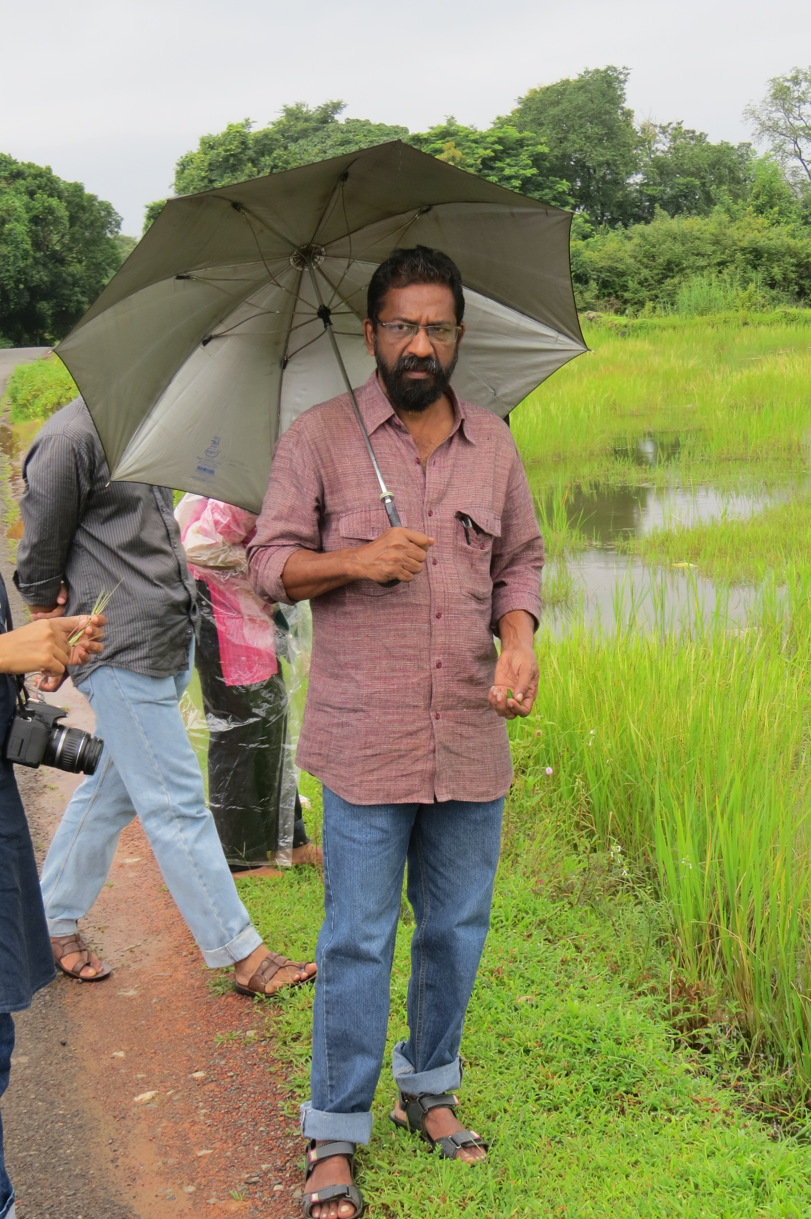 Photos by Vinayaraj